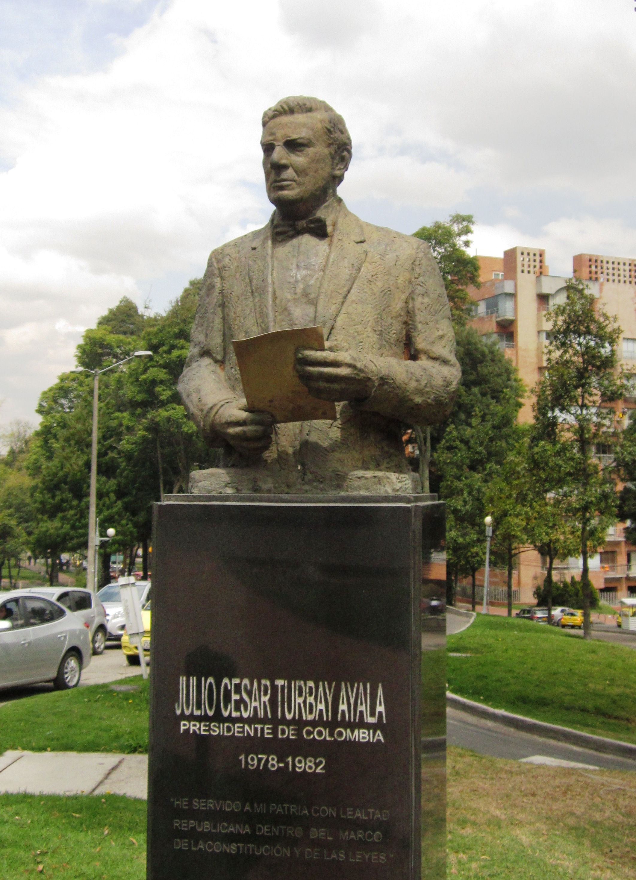 Bogotá Busto de Julio César Turbay en la calle 94 con carrera 7 El Chicó, al norte de la localidad de Chapinero.